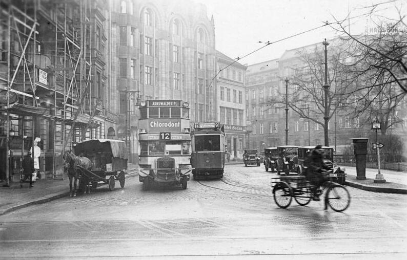 ADN-Zentralbild / Archiv Berlin im Jahre 1929 Um den Verkehrsfluß am Askanischen Platz zügiger zu gestalten, erhält die Straßenbahnlinie 23 eine neue Streckenführung, und wird den Verkehr auf dem Askanischen Platz entlasten. 8235-29 [Scherl Bilderdienst]